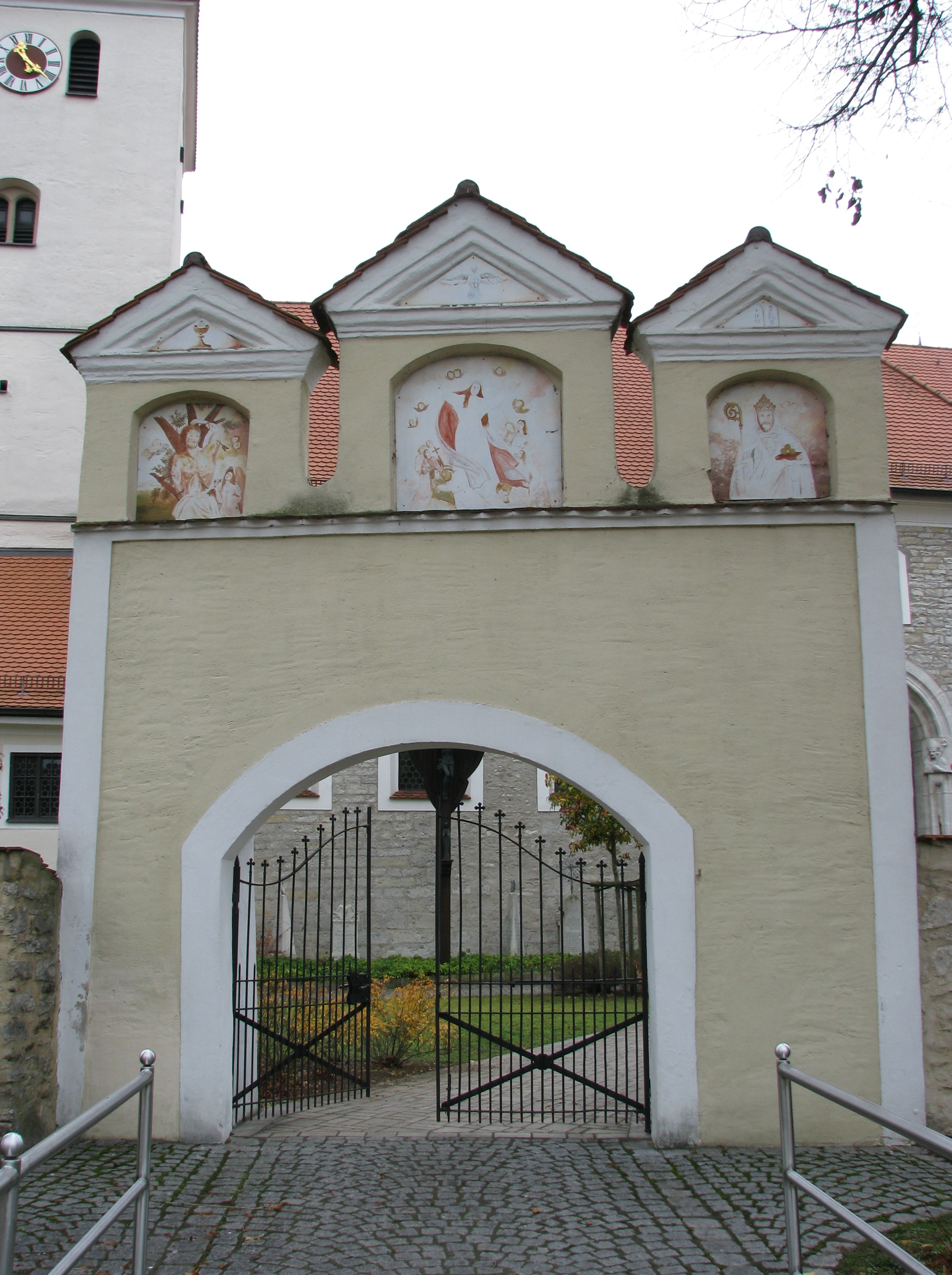 Erasbach, Landkreis Neumarkt in der Oberpfalz, Kath. Pfarrkirche Mariä Heimsuchung, Friedhofstor